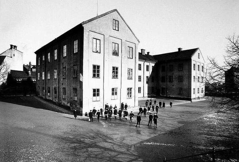 Malongen, Södermalm (som skolhus)